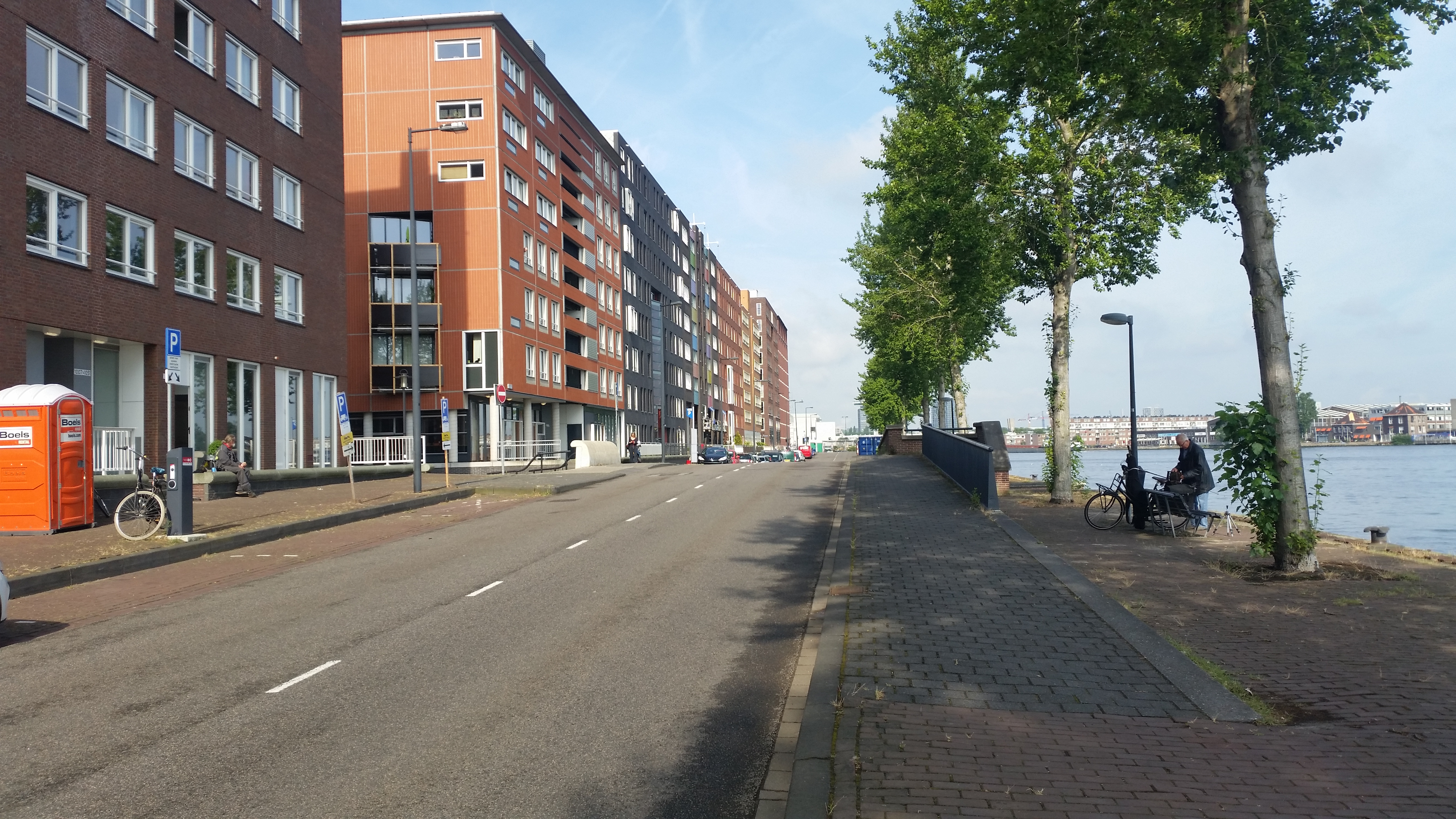 Overzicht over Brug 1990, Lamong